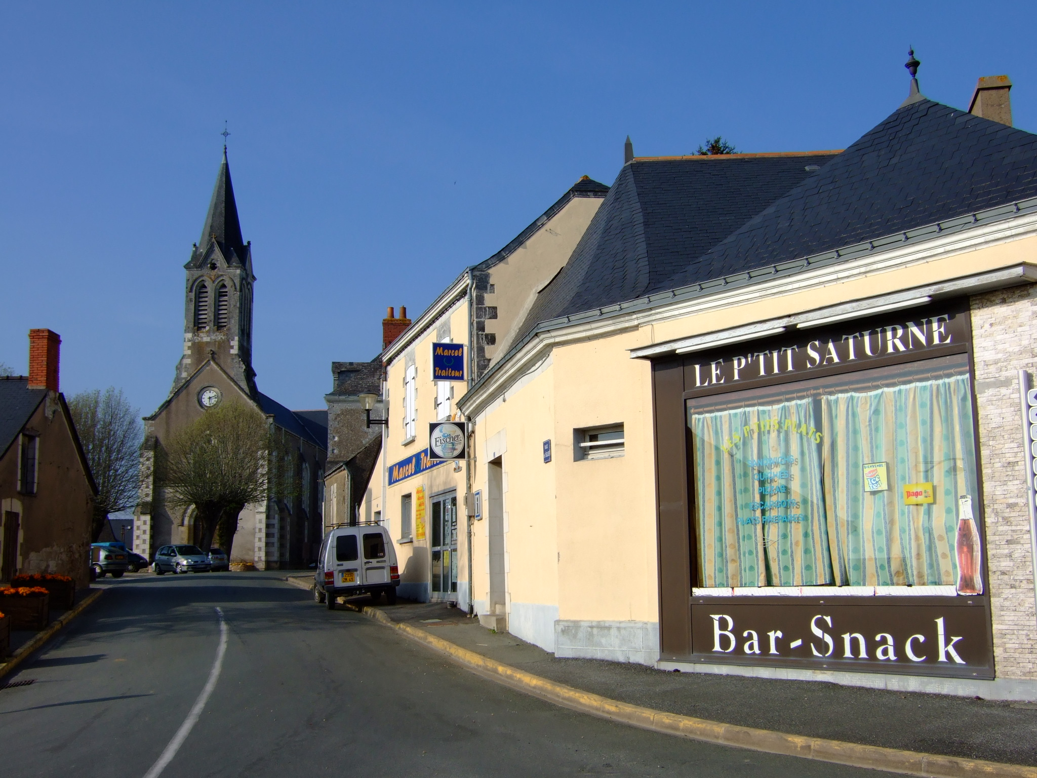 Le vieux village à Saint-Saturnin-sur-Loire